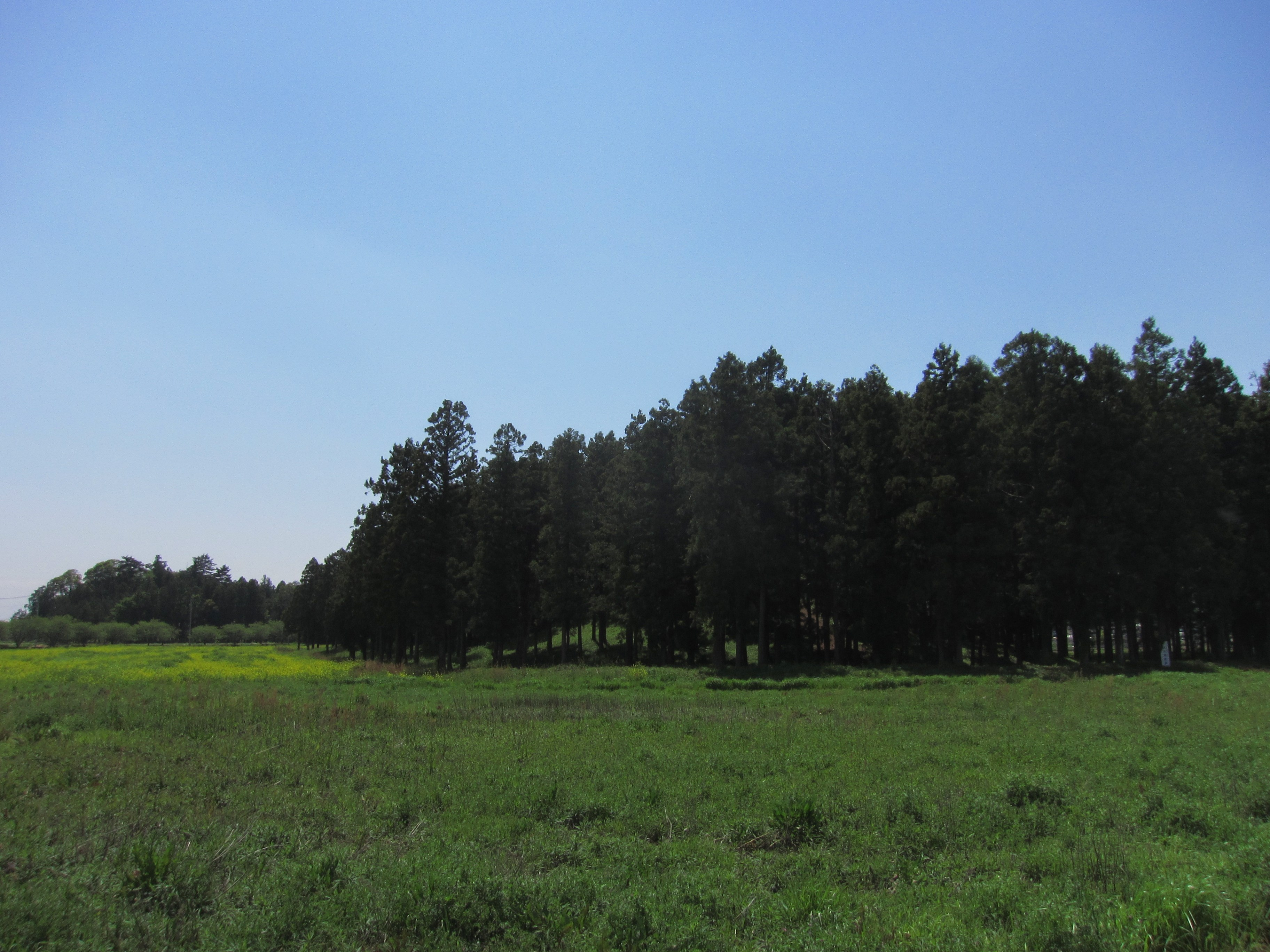 琵琶塚古墳 (右手前) と摩利支天塚古墳 (左奥)